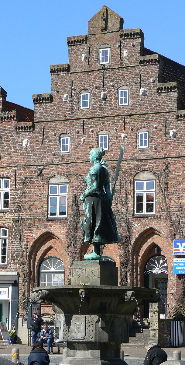 Der als Tinebrunnen bekannte Asmussen-Woldsen-Brunnen (Wahrzeichen von Husum).